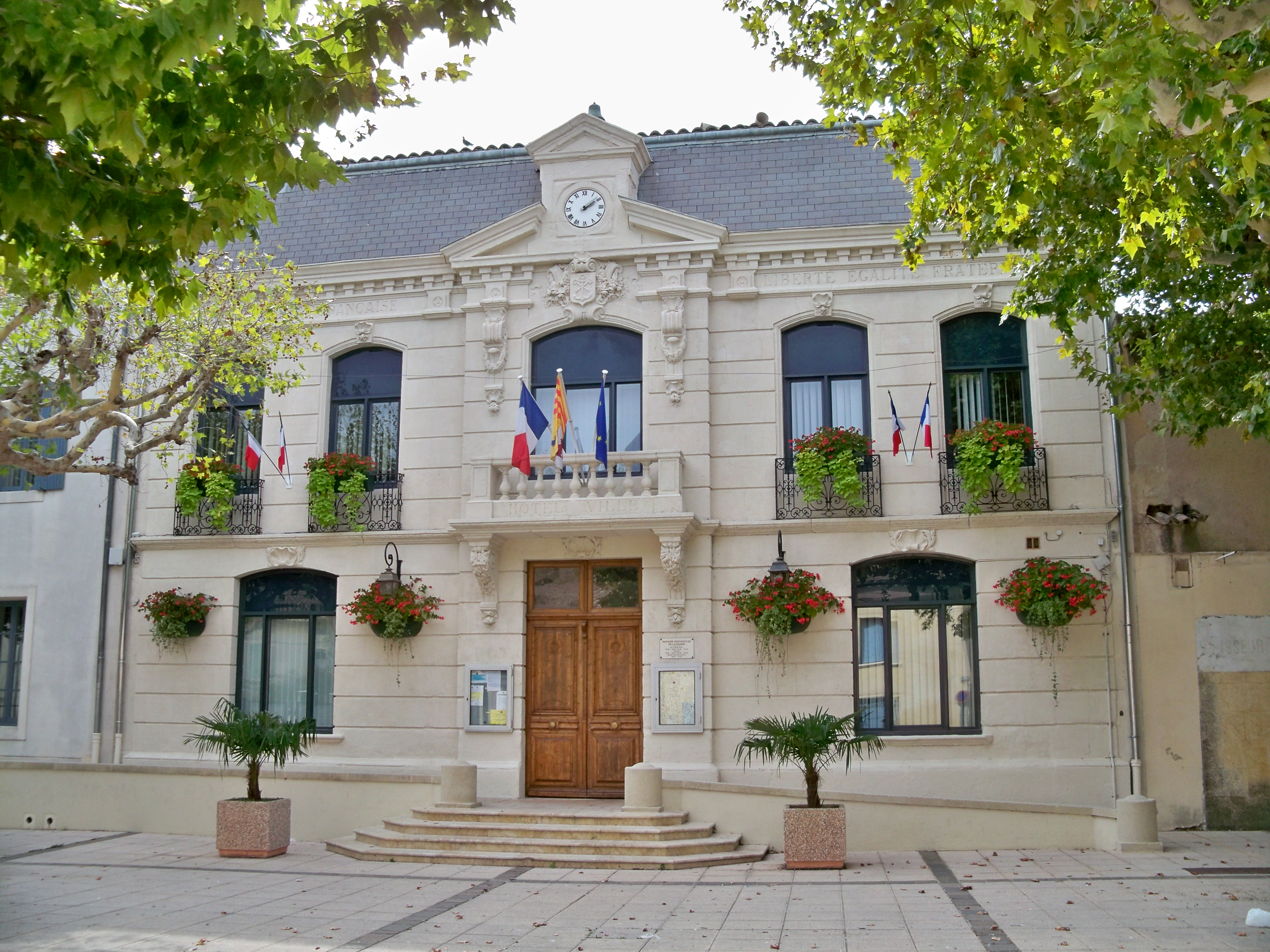 Mairie de Lapalud (84)